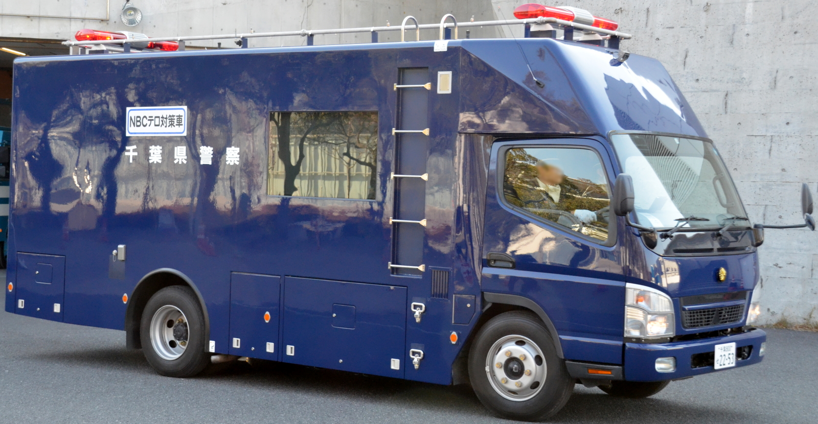 千葉県警のキャンターNBCテロ対策車